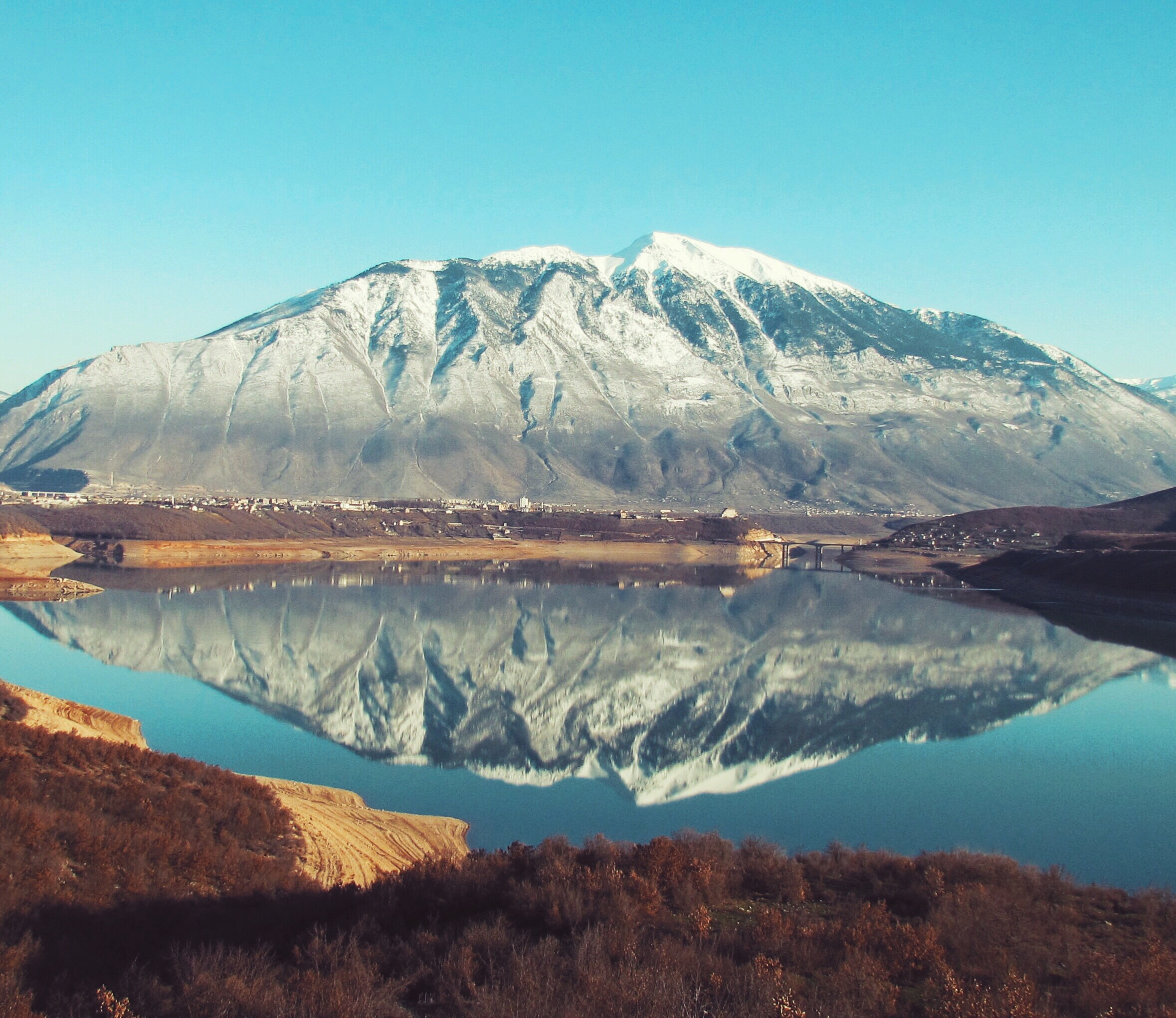 Mali i Gjallicës ndodhet në territorin e Kukësit. Ai është një nga malet më impozant që mund të kundrohet nga rrëza deri në majë. Është simbol i Krahinës së Lumës. Me këtë mal lidhet edhe festa e Gjallicës e cila bëhet të enjten e parë të muajit gusht. Festohet kryesisht nga banorët e fshatit Shtiqën që shtrihet rrëzë tij.